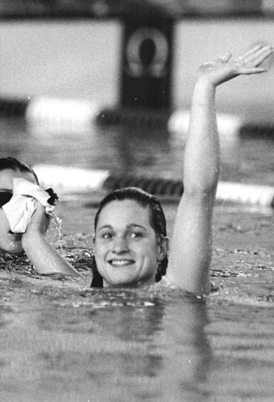 Birte Weigang ADN-ZB Kluge 19.6.87 Erfurt: DDR-Schwimmeisterschaften - Die 19jährige Birte Weigang (SC Turbine Erfurt) setzte den Glanzpunkt des vierten Tages der meisterschaften mit ausgezeichneten 59,47 s (Jahreswltbestzeit) über 100 m Schmetterling. Sie kam damit in der ewigen Weltbestenliste von Platz 11 auf Rang 6.